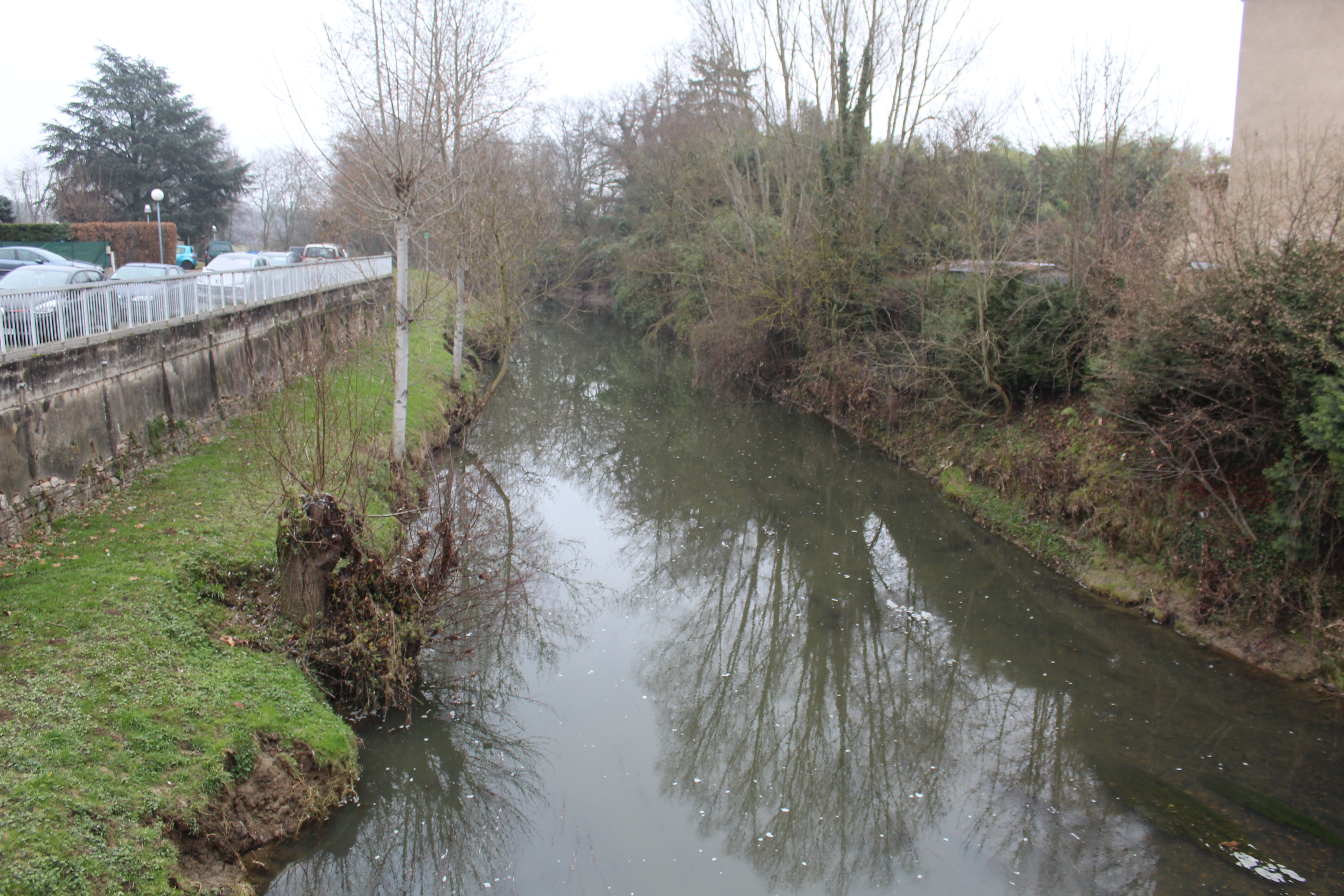 La Chalaronne entre Thoissey et Saint-Didier-sur-Chalaronne près de l'Hôpital de Thoissey.